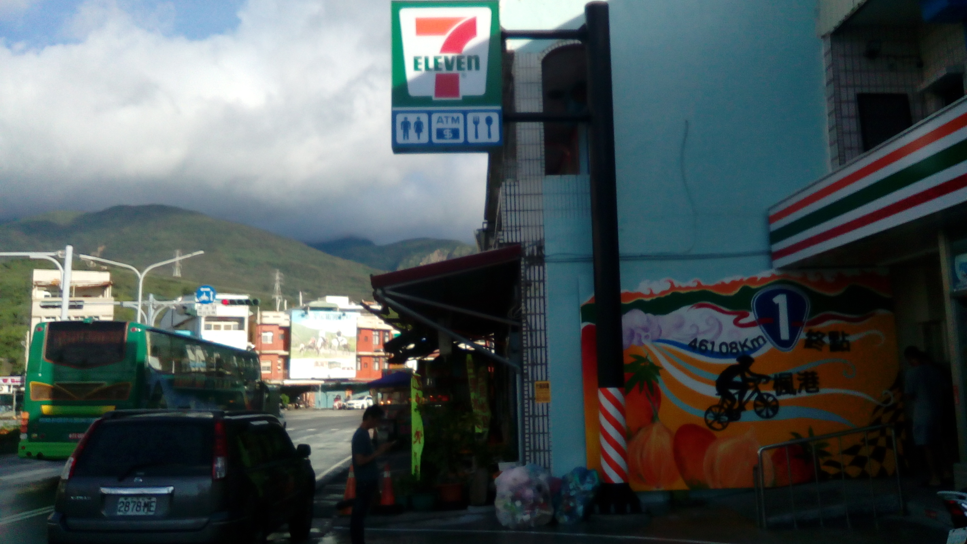 台一線461K終點處 統一超商